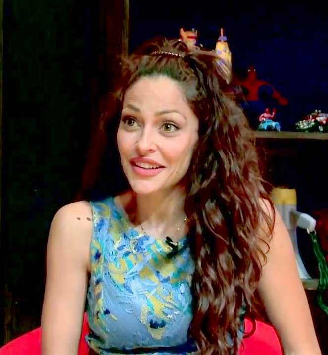 Entrevista a Patricia Pérez en el Teatro Bellas Artes con motivo del estreno de "El amor de Eloy"